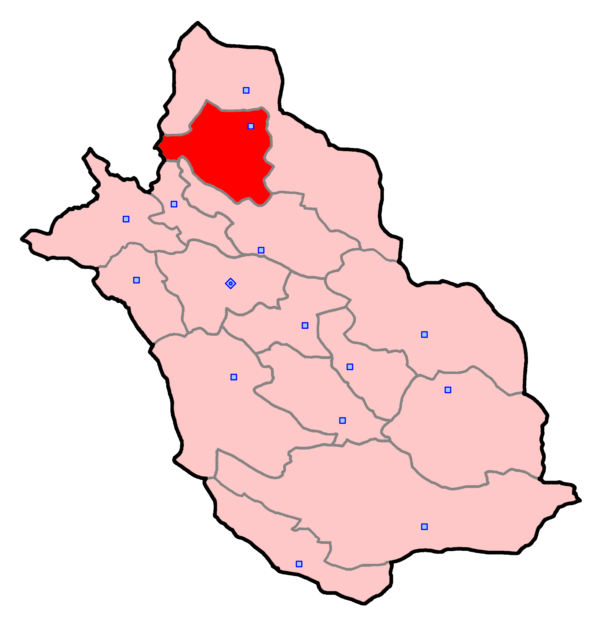 حوزهٔ انتخاباتی اقلید برای انتخابات مجلس شورای اسلامی